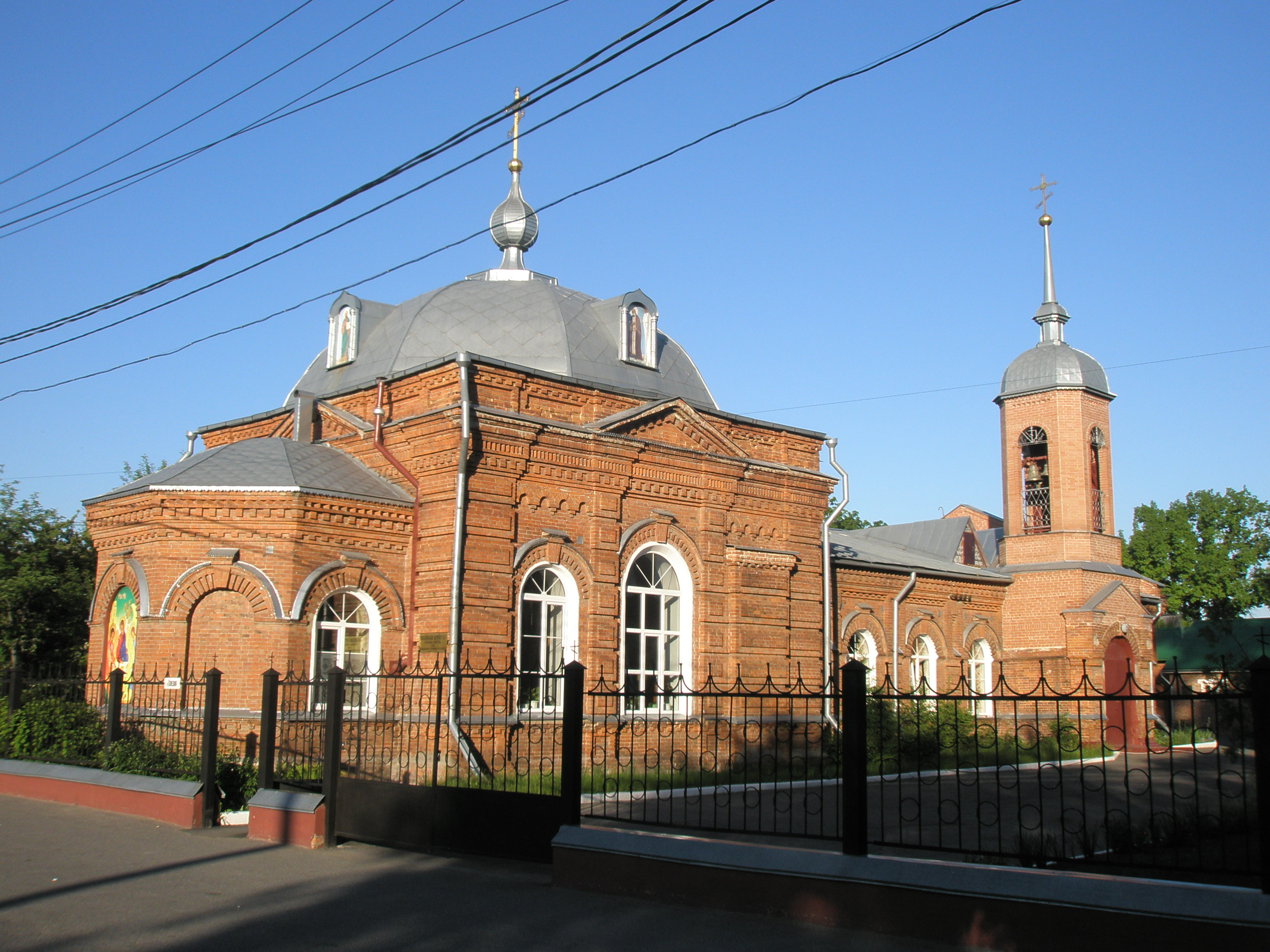 Храм Преподобного Серафима Саровского в Курске, май 2011 г.